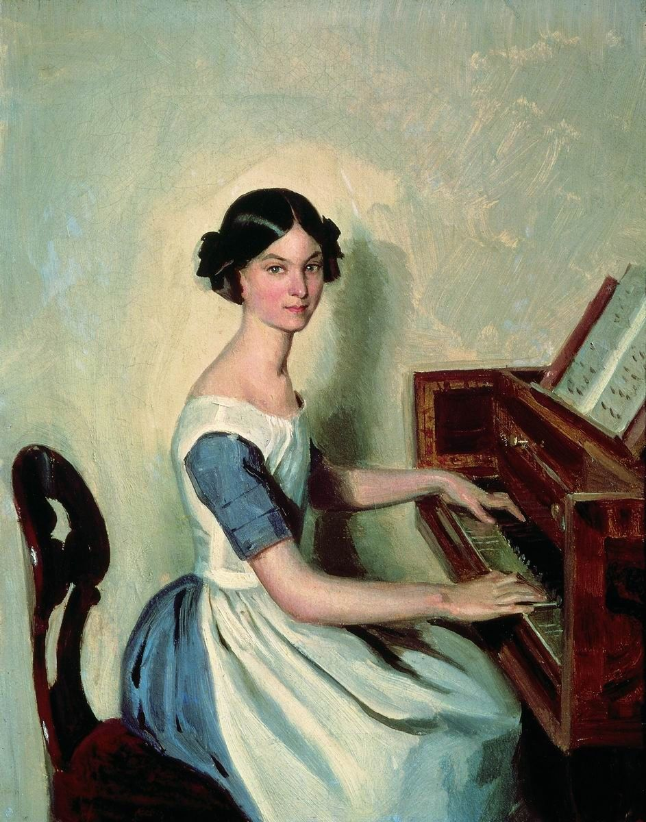 Портрет Надежды Петровны Жданович в замужестве Вернер, за клависино